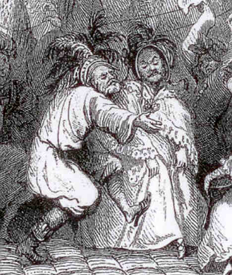 Détail d'une gravure figurant le cortège de la Descente de la Courtille au Carnaval de Paris.